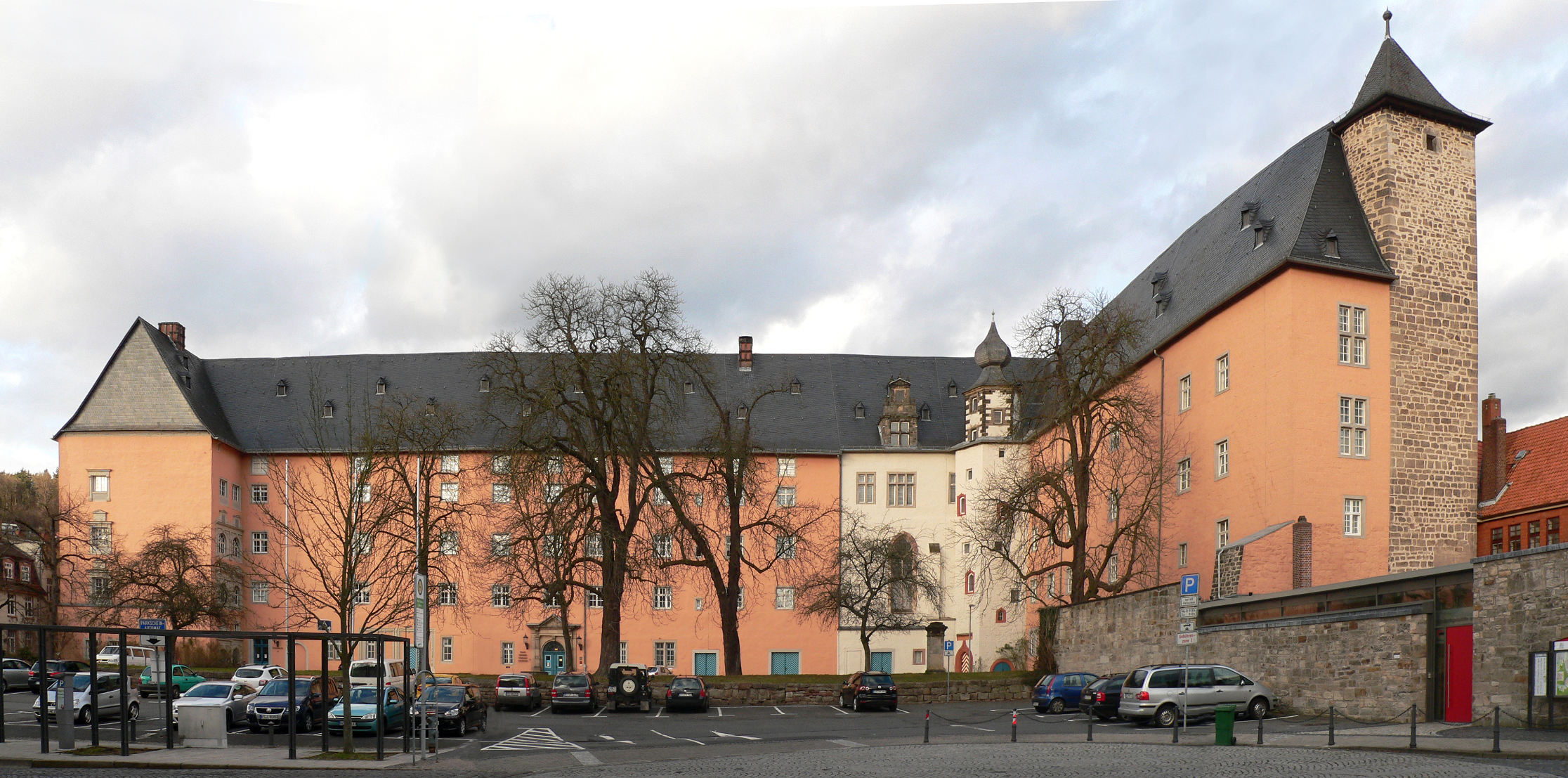 Innenhof des Welfenschloss (Hann. Münden)